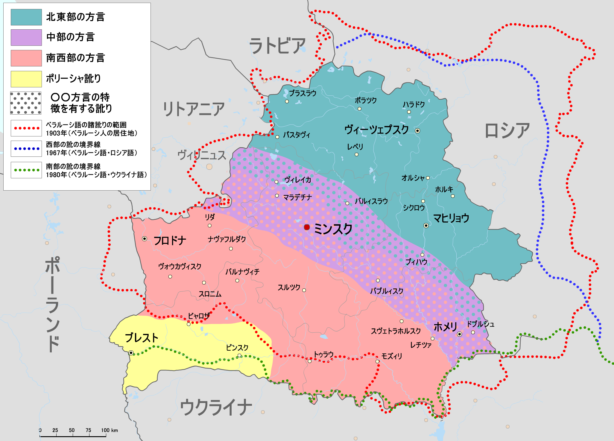 ベラルーシ語の方言図 方言 北東部の方言 中部の方言 南西部の方言 ポリーシャの訛（ウクライナ語の訛の一つ） 線 1903年におけるベラルーシ語の話者の居住地域 1967年におけるベラルーシ語・ロシア語の境界線 1980年におけるベラルーシ語・ウクライナ語の境界線